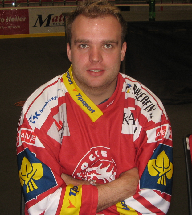 Po zakončení sezóny 2014/15 ve Werk Areně